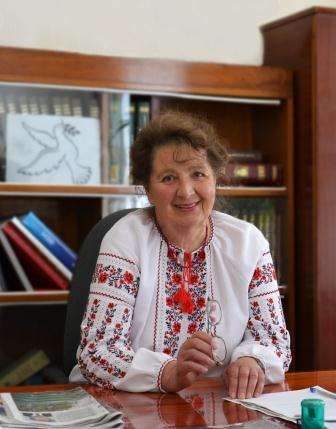 Генеральний директор ННМБУ